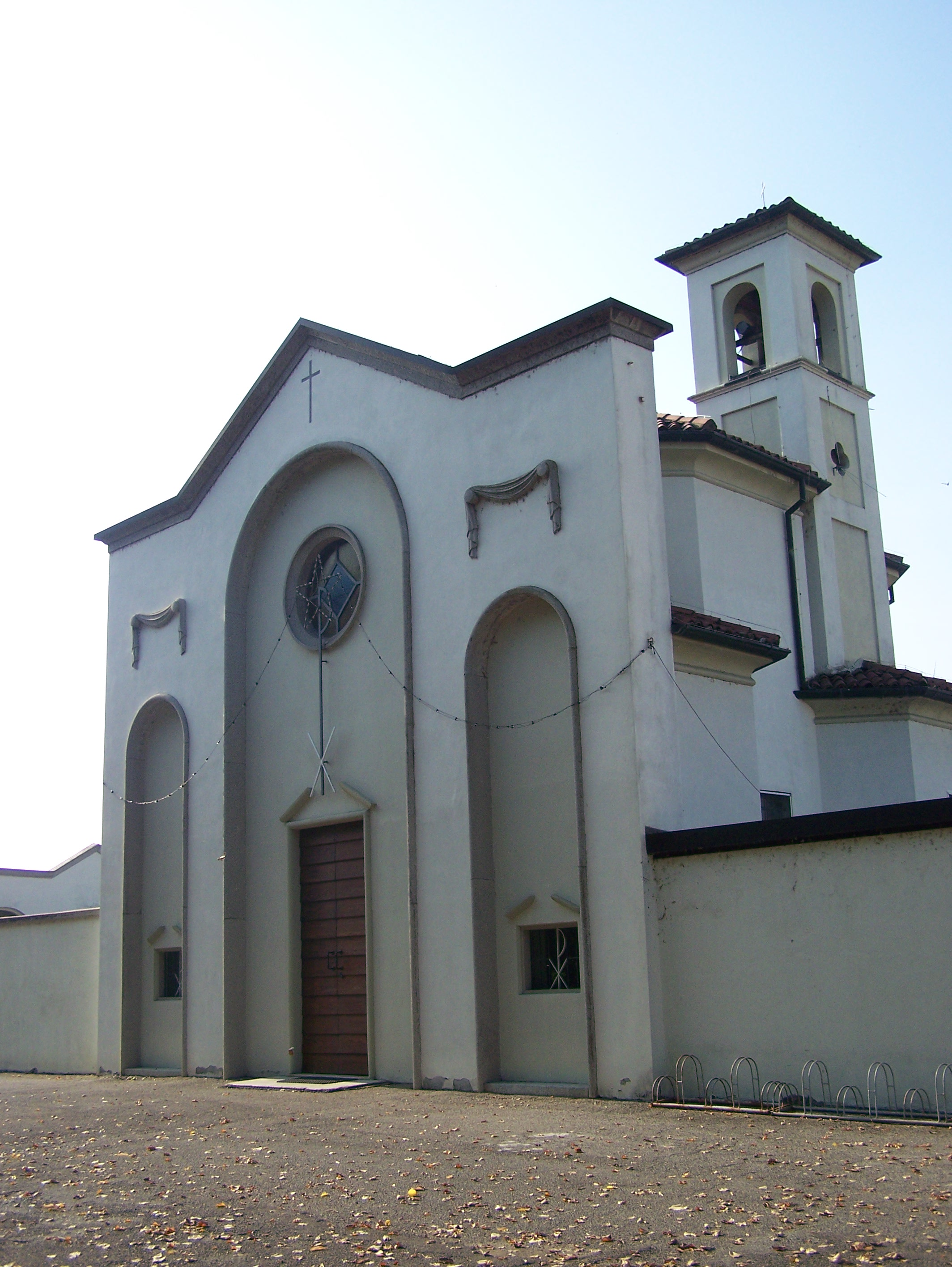 Chiesa di Santa Maria della Rosa a Robecco sul Naviglio (MI) - Italy